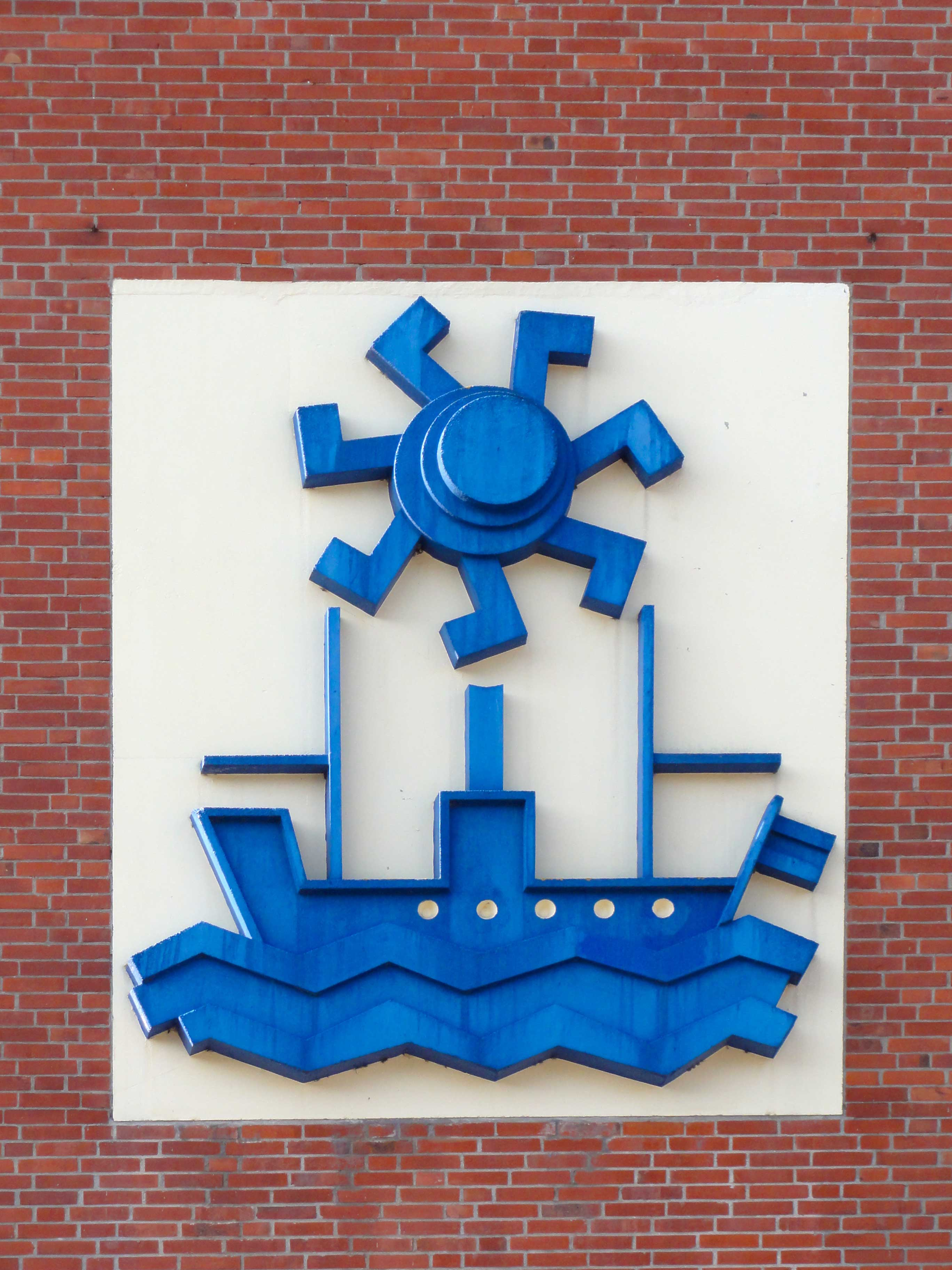 Reliëf, Zamenhofstraat Amsterdam